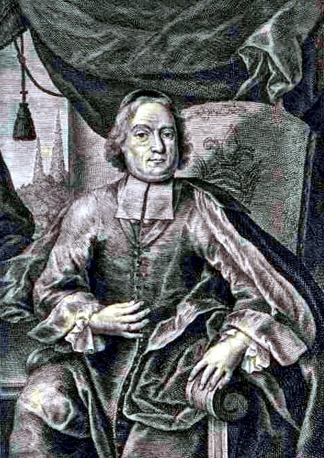 Franz Julian Graf Braida von Ronsecco und Cornigliano 1725, Bischof von Hippo und Weihbischof von Olmütz